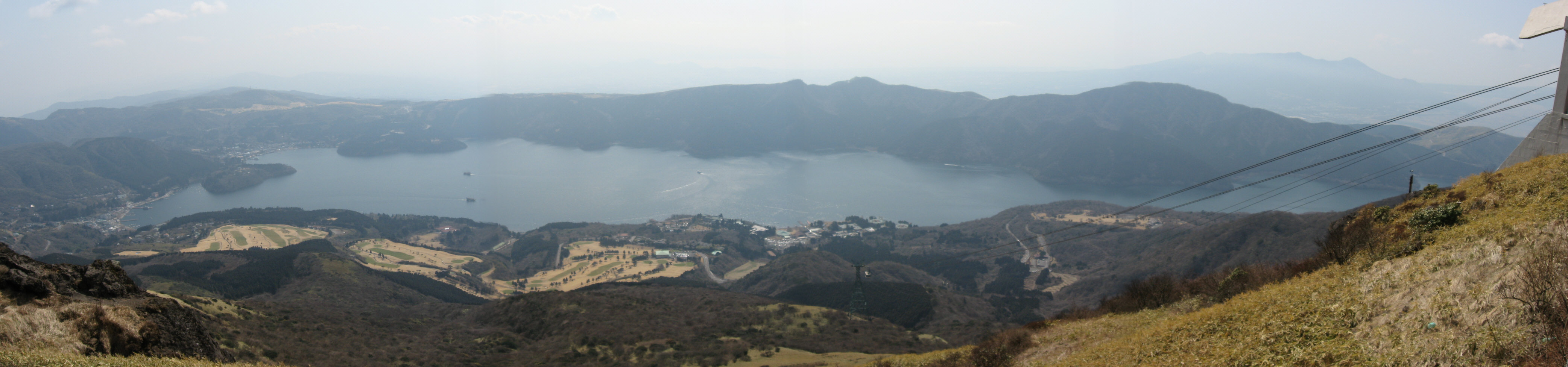 箱根駒ヶ岳から見た芦ノ湖